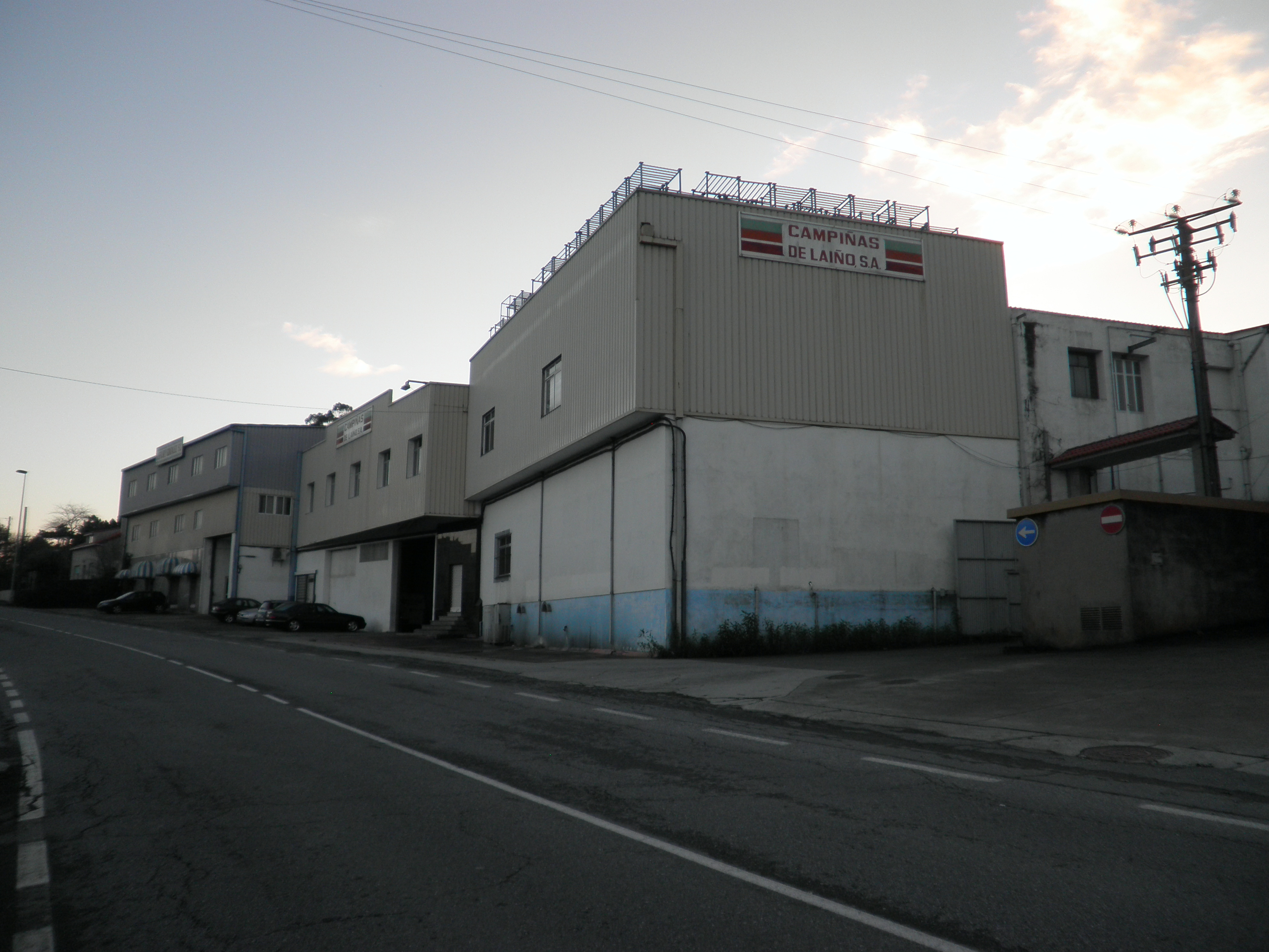 Factoria de productos cárnicos Refojo y González-Campiñas de Laíño en Imo, Dodro